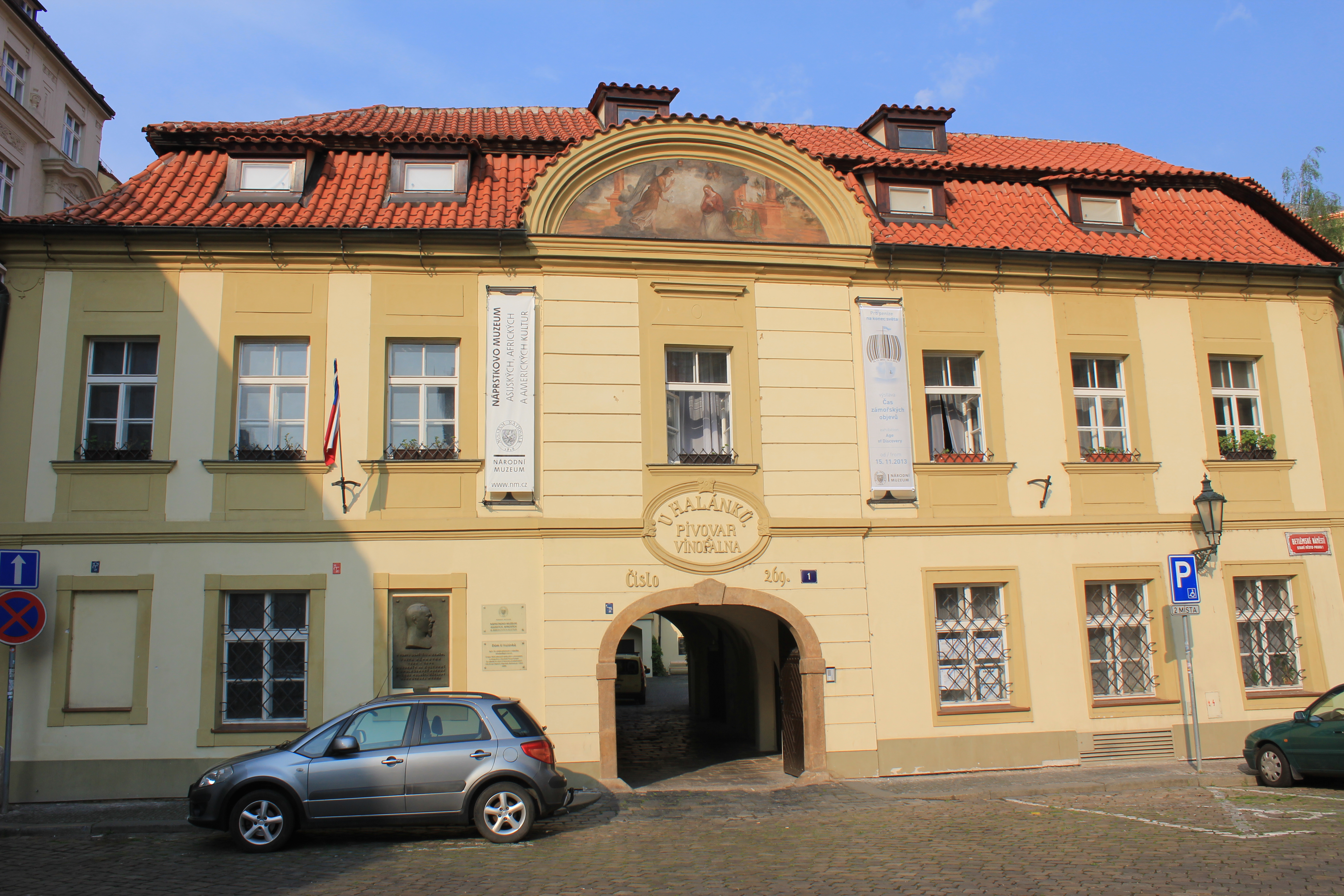 Narodni Museum